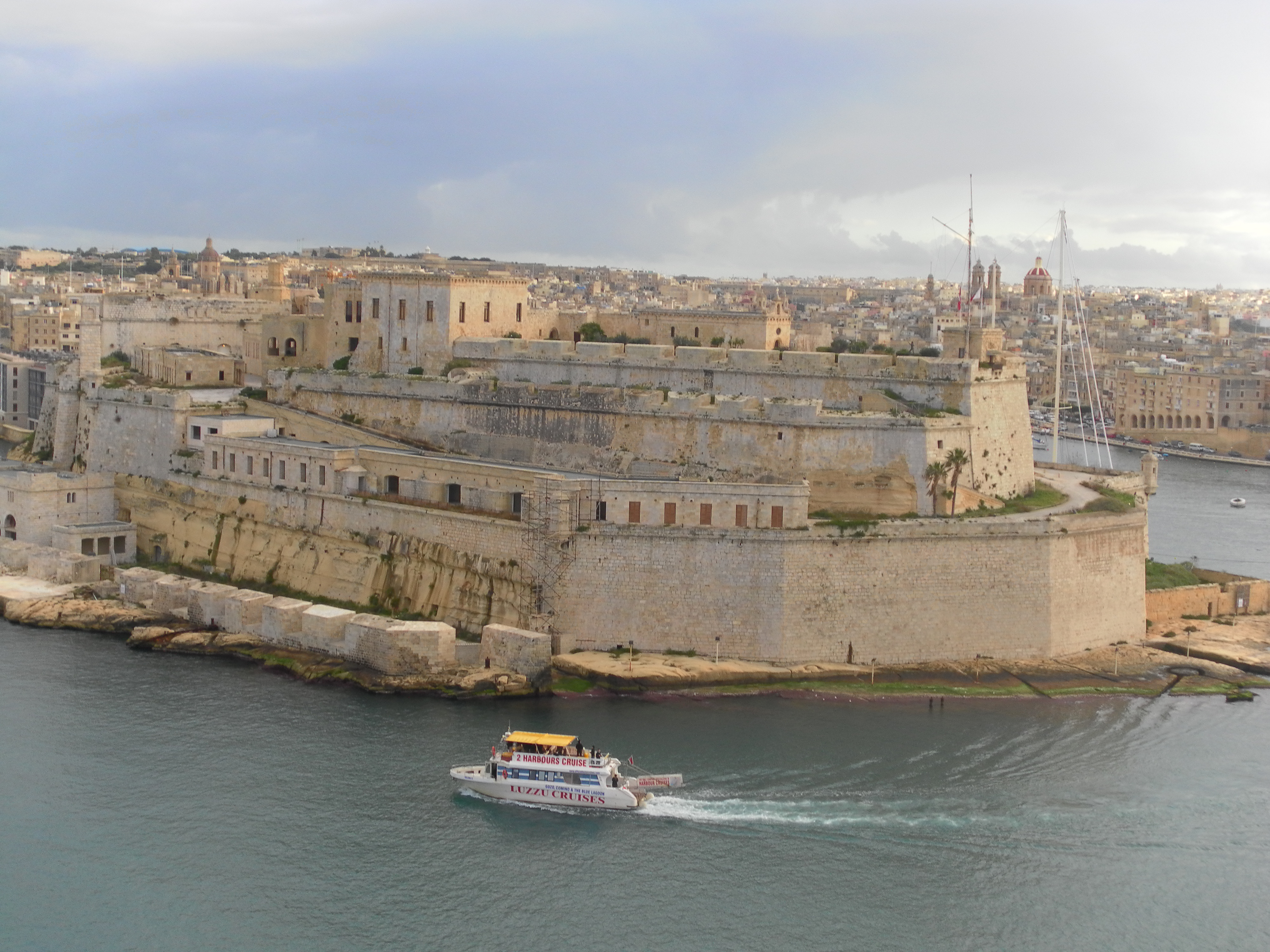 Fort St. Angelo in Birgu, Malta